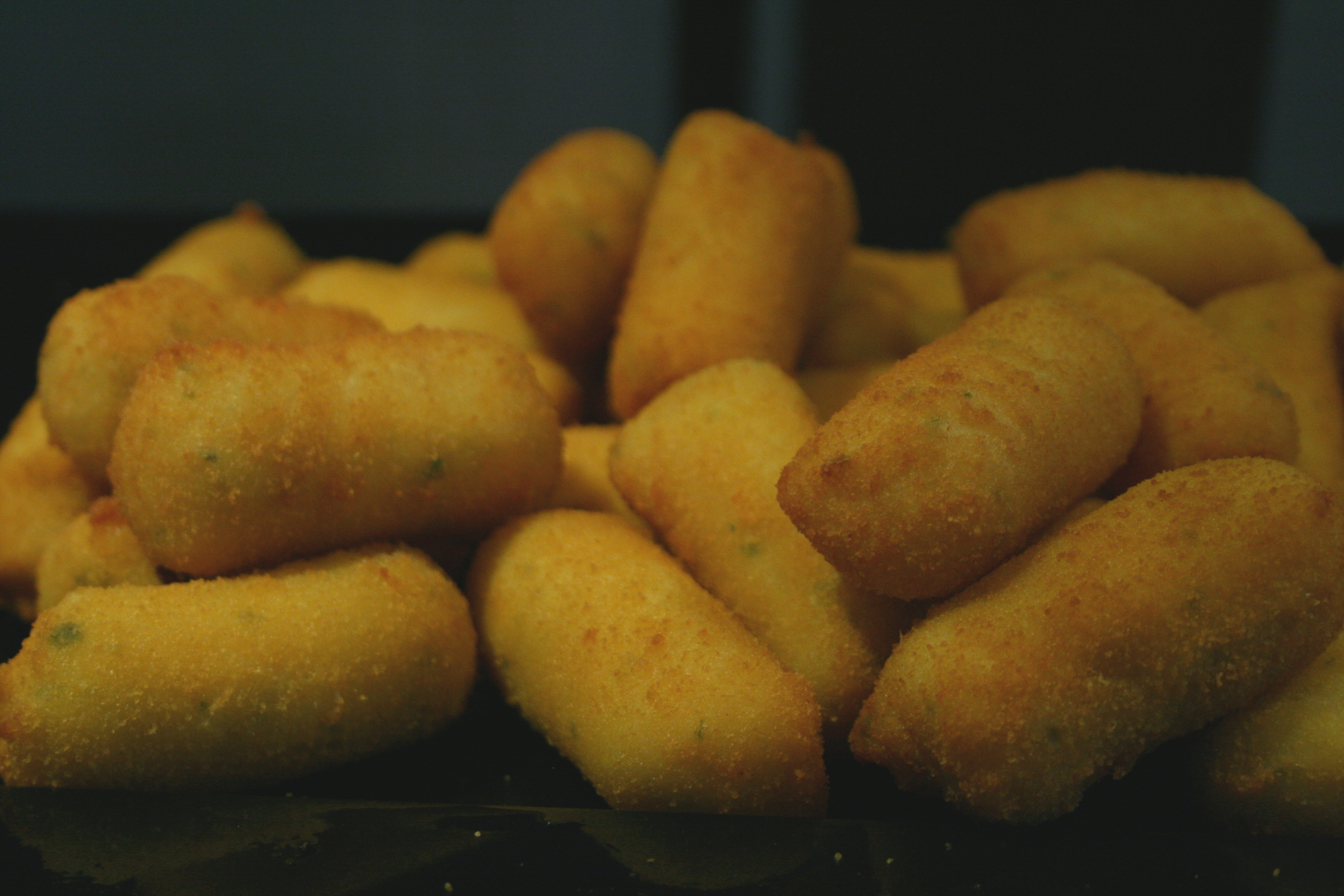 Croquetas